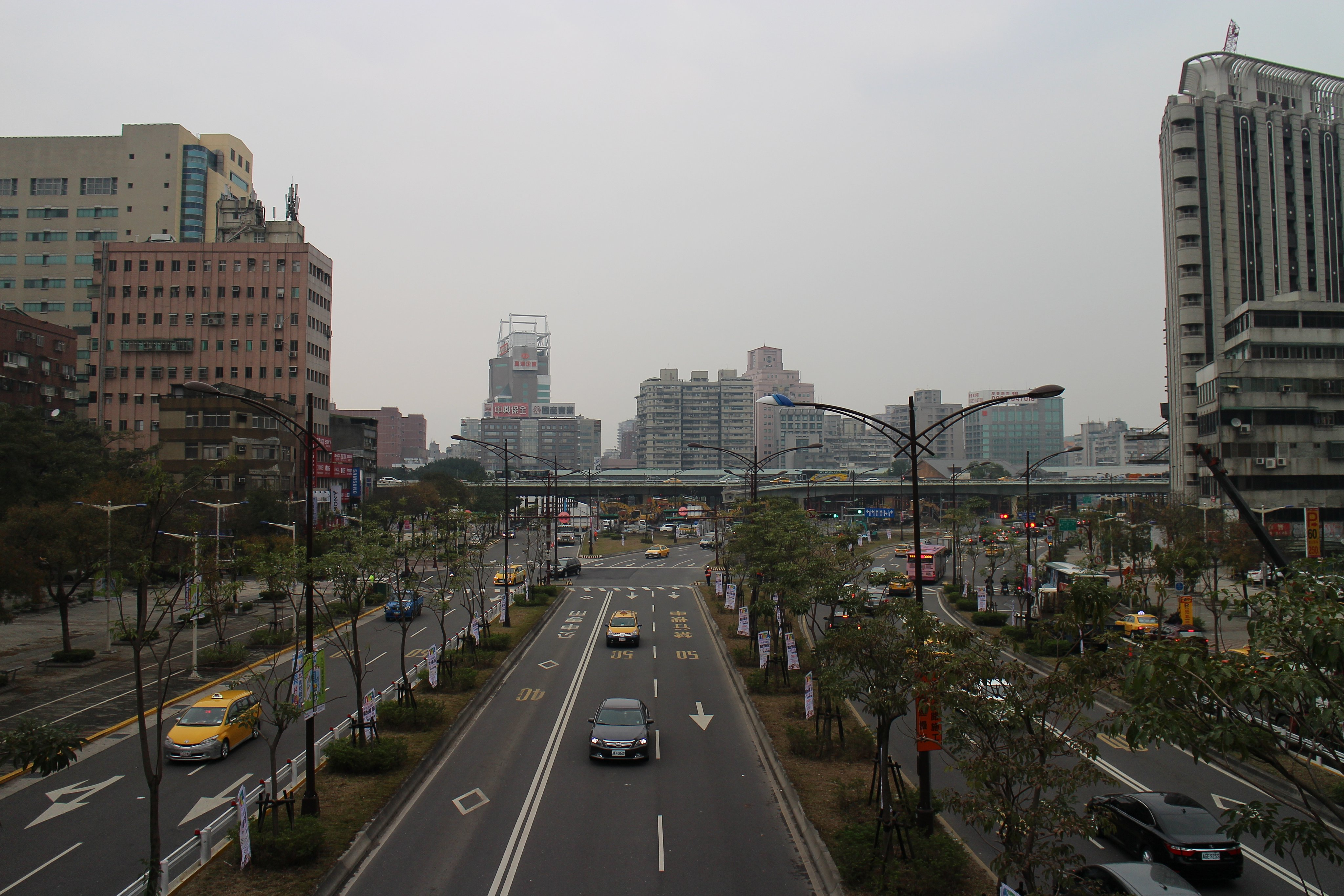 由臺北市中華路一段人行天橋看向忠孝橋引道。